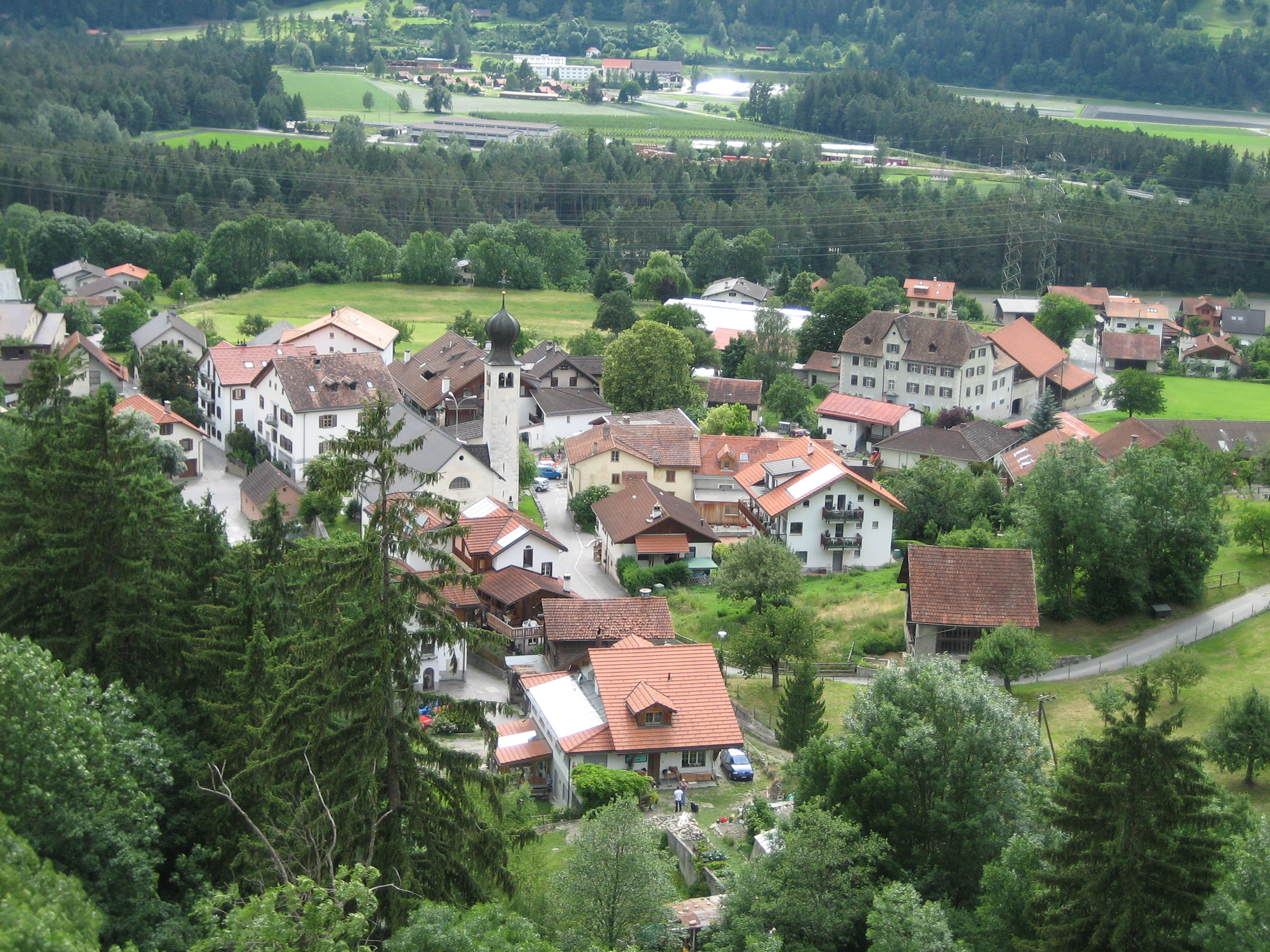 Rodels von Norden